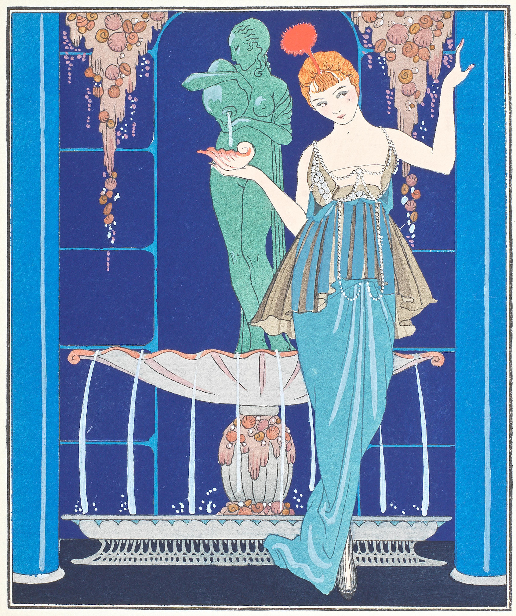 Jeanne Paquin Gown